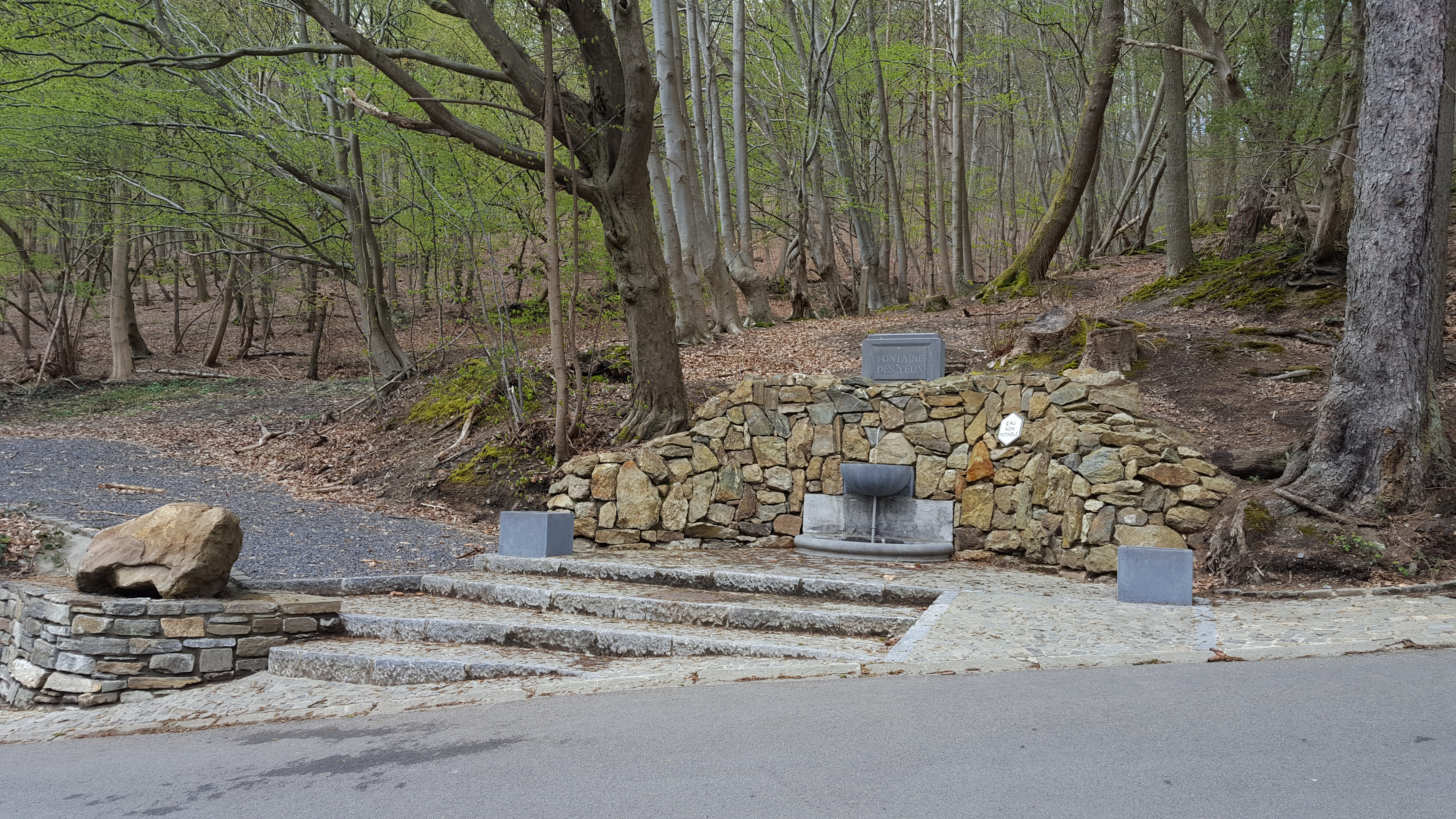 Fontaine des Yeux, Spa, Belgique